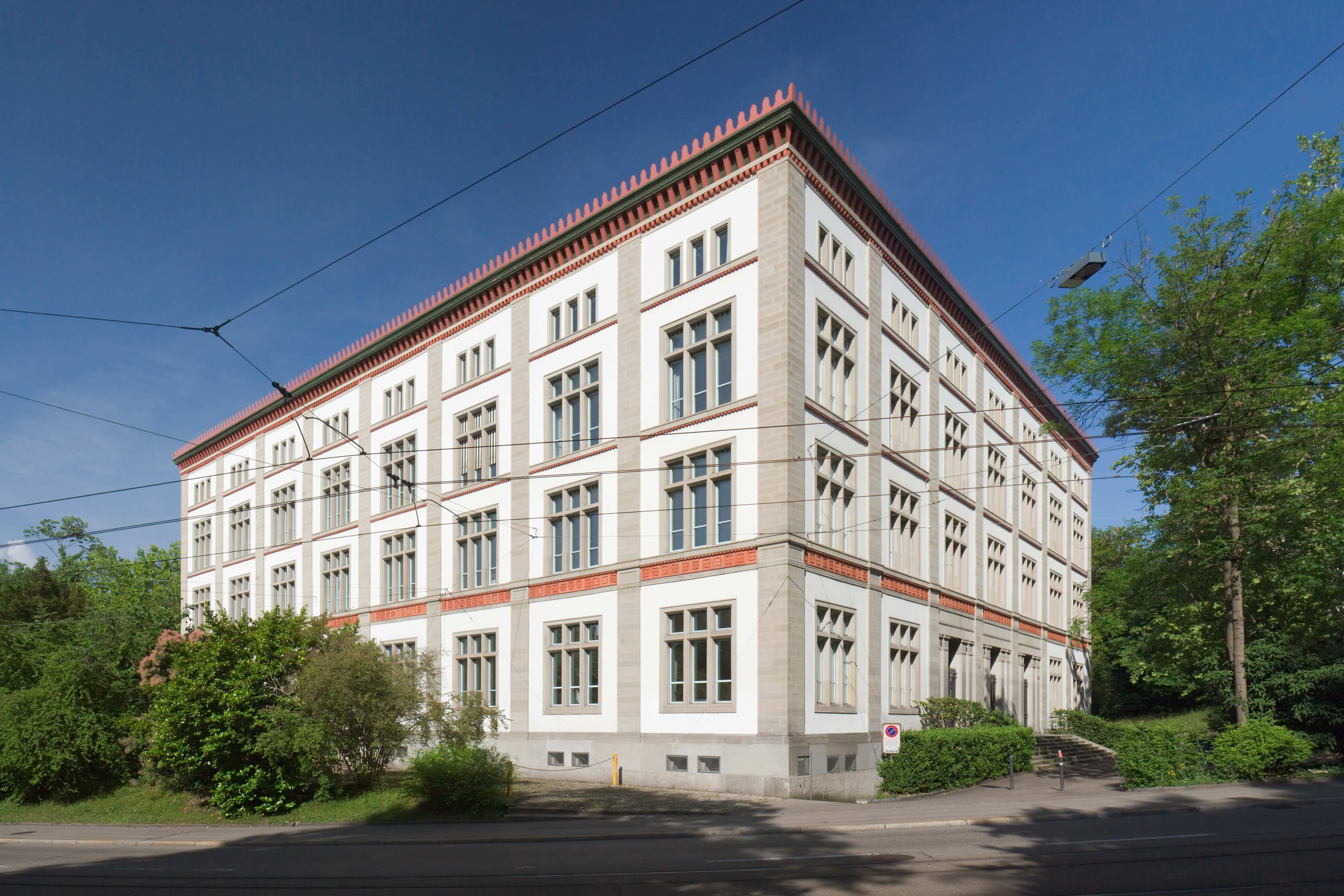 Das Kantonsschulgebäude von Gustav Albert Wegmann an der Rämistrasse 59 in Zürich, Schweiz